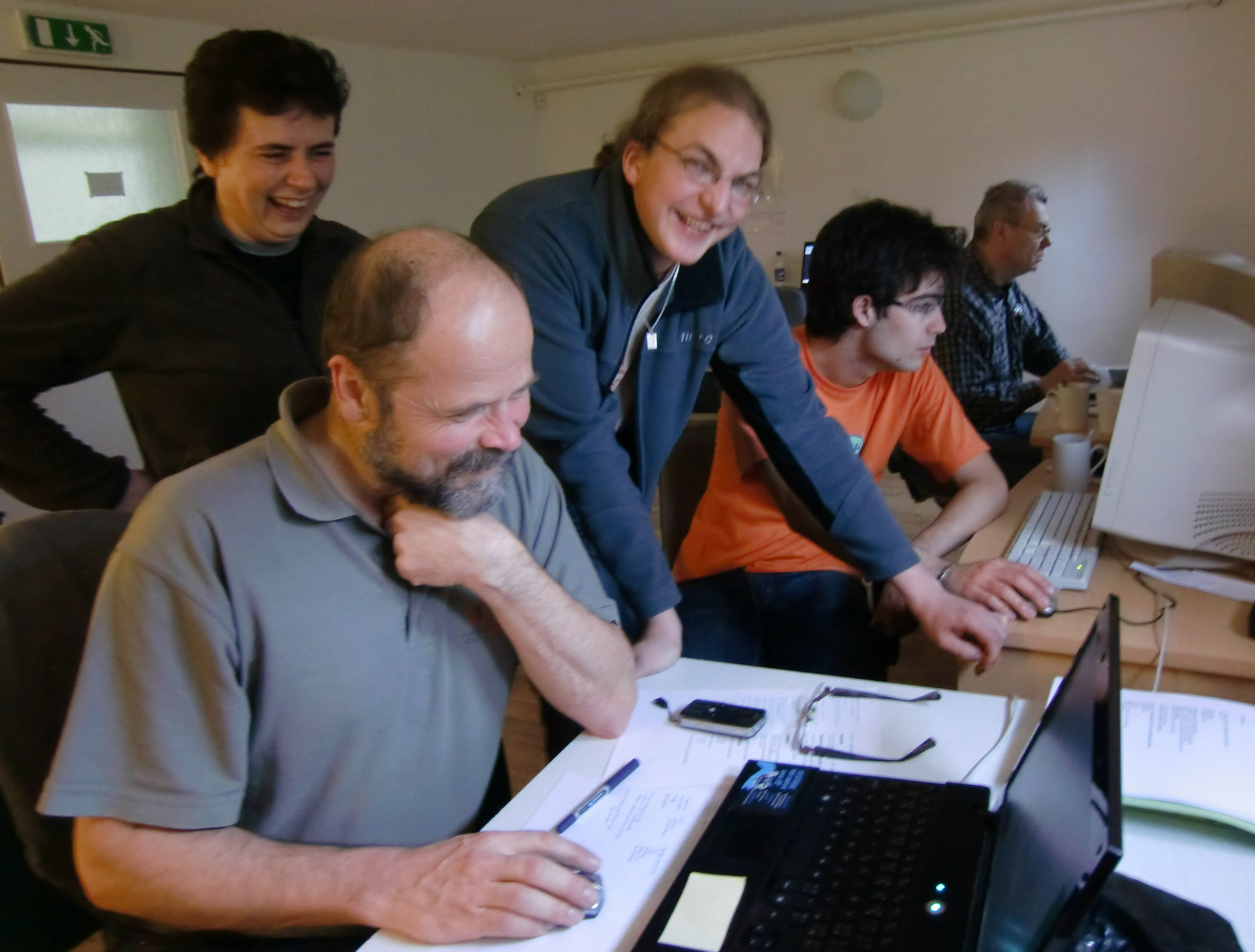 La V-a Sabla Printempo 2010 (internacia trejnseminario "Esperanto kaj Interreto" en Písek, Ĉeĥio). 10.4.2010, parto de la partoprenantoj trejnantaj redaktadon de la nova retpaĝaro de Ĉexha E-Asocio. Surfote (de maldesktre) Miloš Bloudek, Vlasta Pištíková, Aleš Tomeček, Miroslav Hruška, Petr Chrdle.